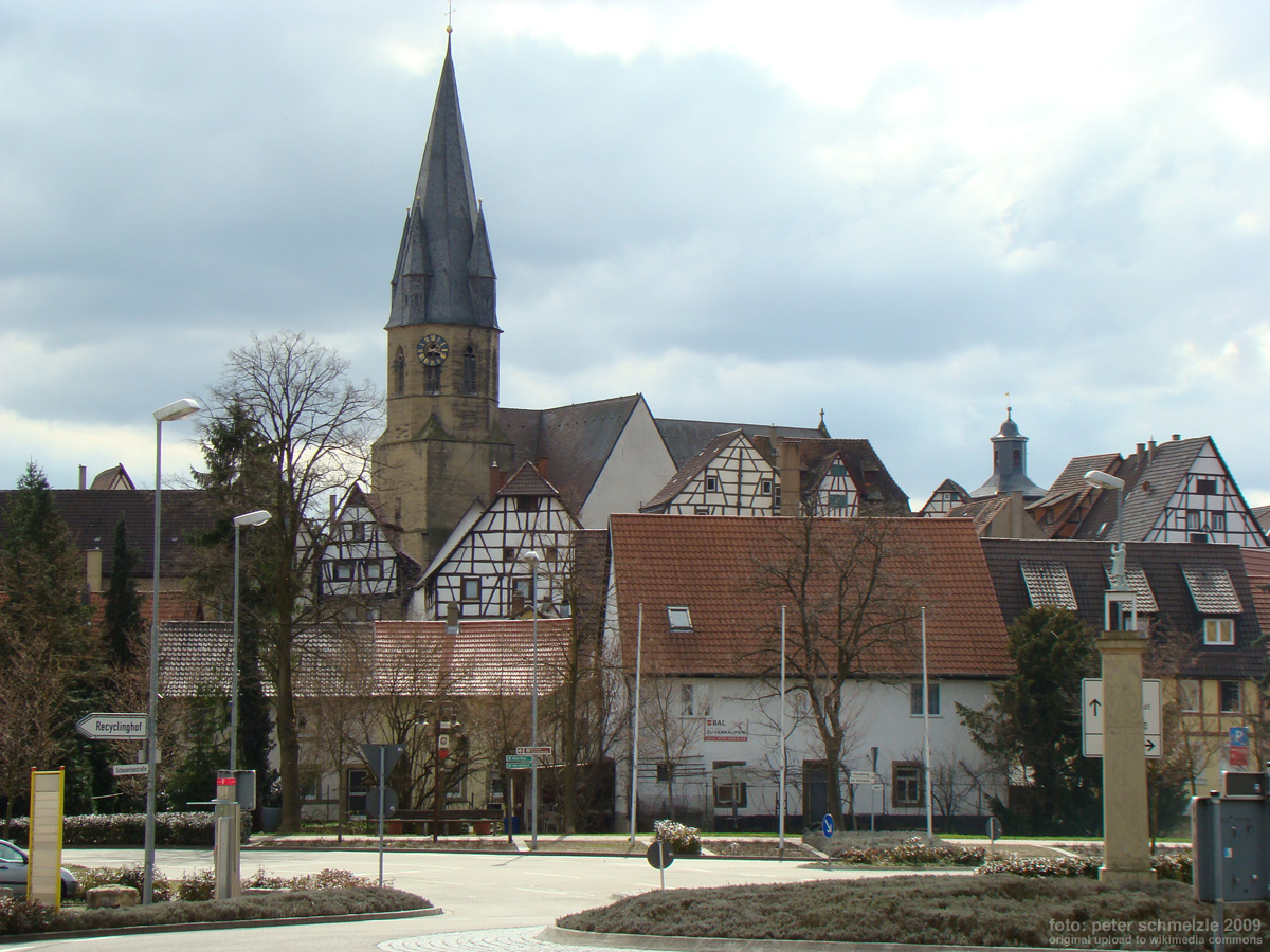 Blick auf die Altstadt von Eppingen mit kath. Stadtkirche